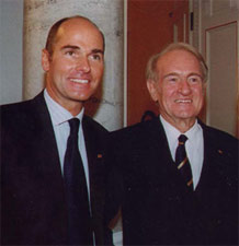 Hubertus Hoffmann erhält Bundesverdienstkreuz